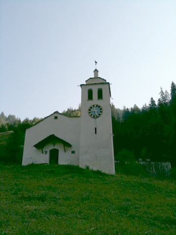 reformierte Kirche Ausserferrera (Kanton Graubünden)